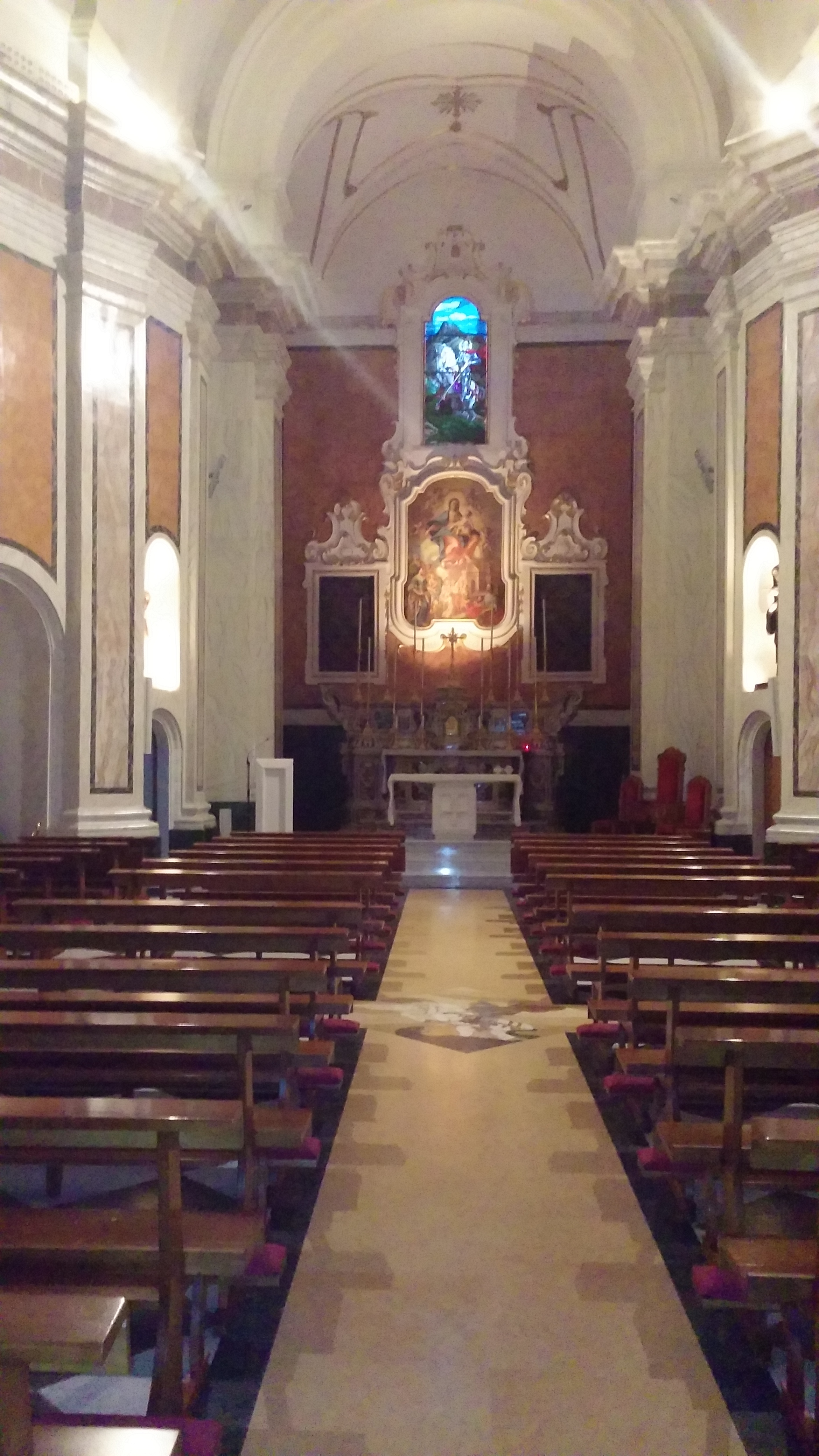 Chiesa matrice, dedicata a Santa Maria del Popolo